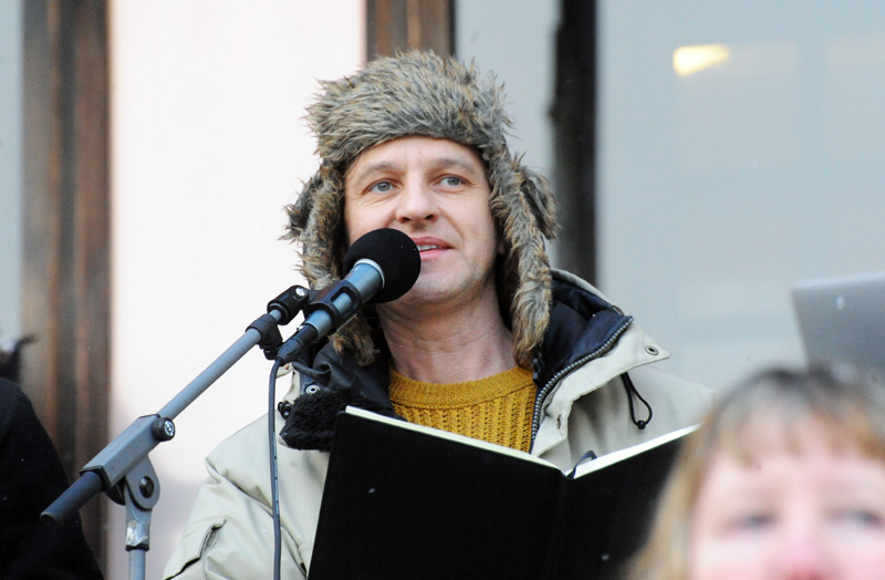 Björn Kjellman